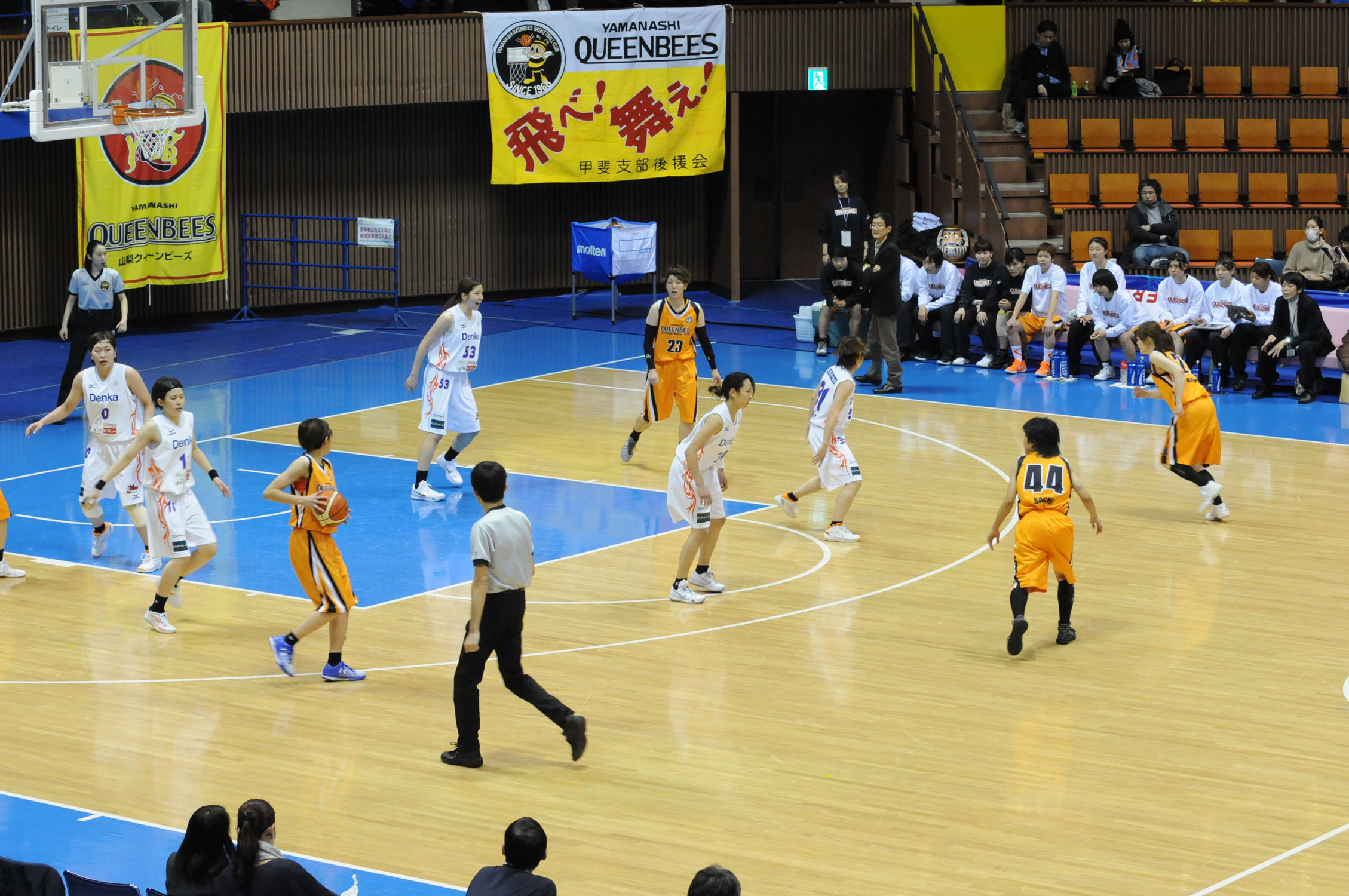 2016年全日本総合バスケットボール選手権大会二回戦、新潟アルビレックスBBラビッツ対山梨クィーンビーズ。代々木第二体育館で。